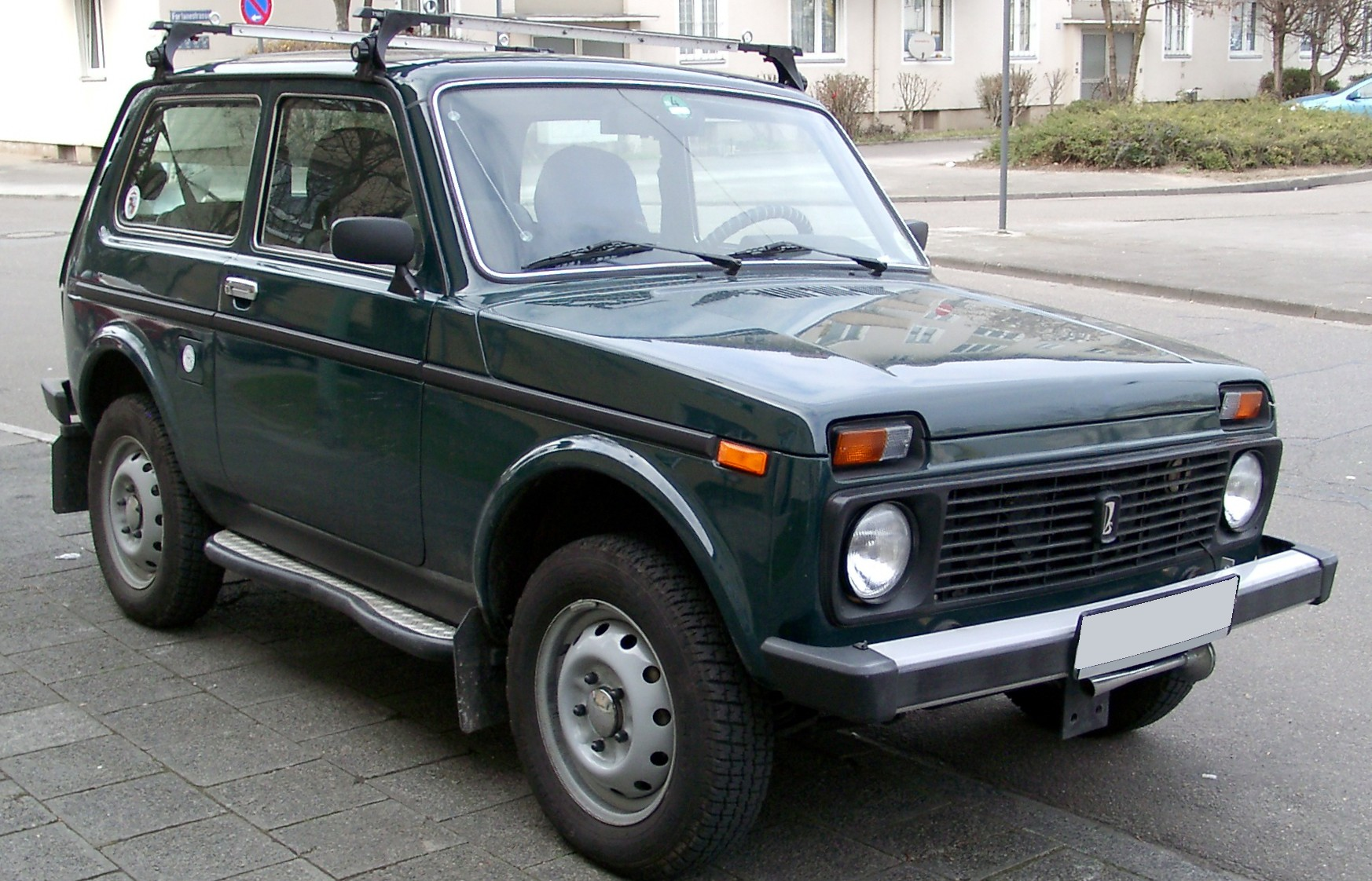 Lada Niva Facelift